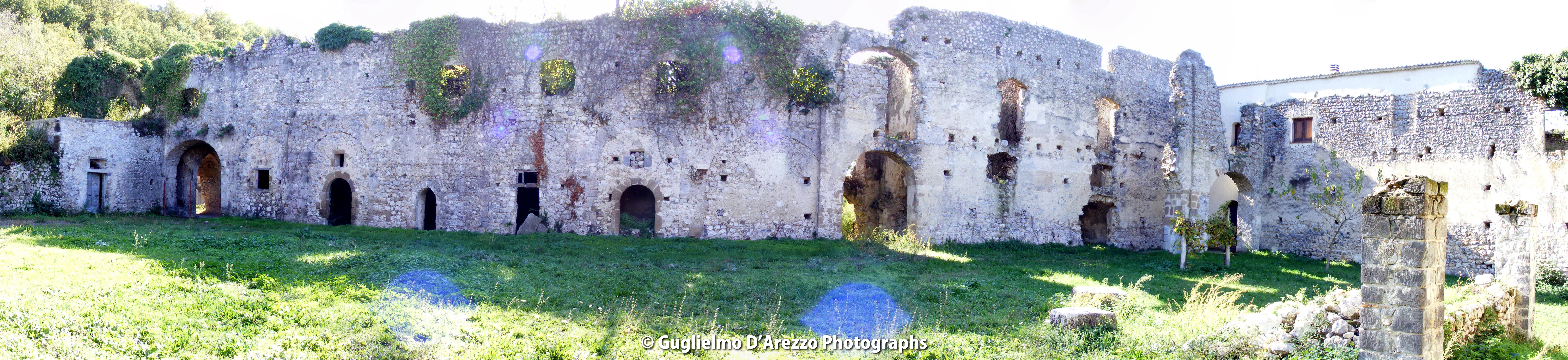 Guglielmo D'Arezzo, autore, Abazia della Ferrara, uso libero con attribuzione.